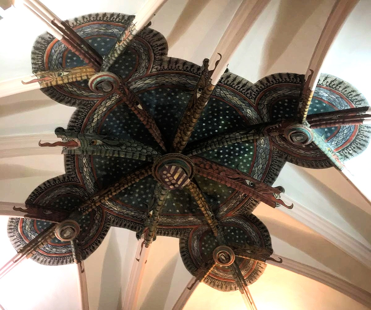 Cúpula de los Dragones Siglo XV. Está situada en el monasterio de Santa Clara la Real de Murcia.